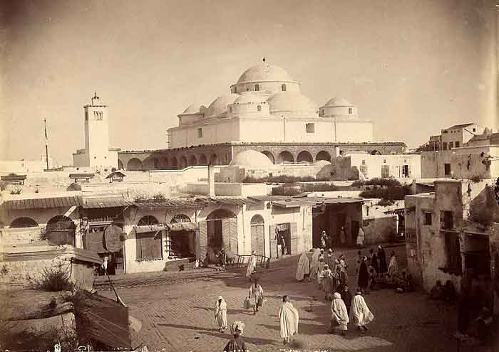 Place Bab Souika et Mosquée Sidi Mahrez en arrière-plan